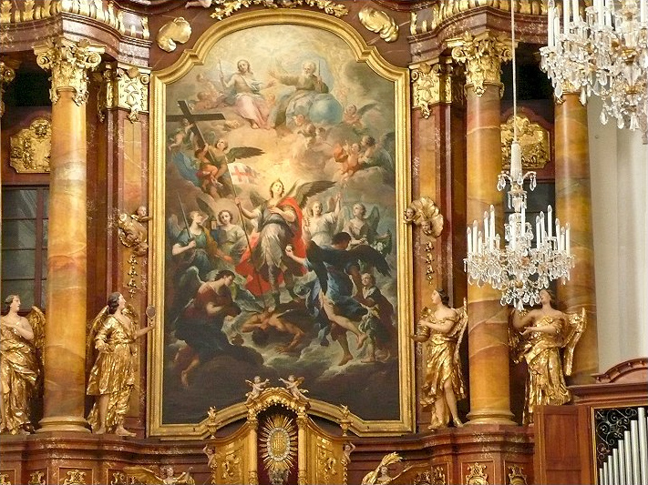 Linz, Ursulinenkirche St. Michael. Hochaltar mit Altarblatt von Martino Altomonte (1738-40).